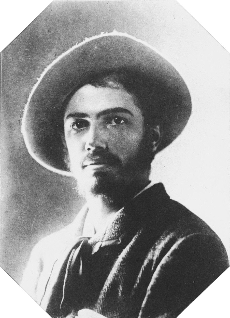 Adolphe Appia a los 20 años